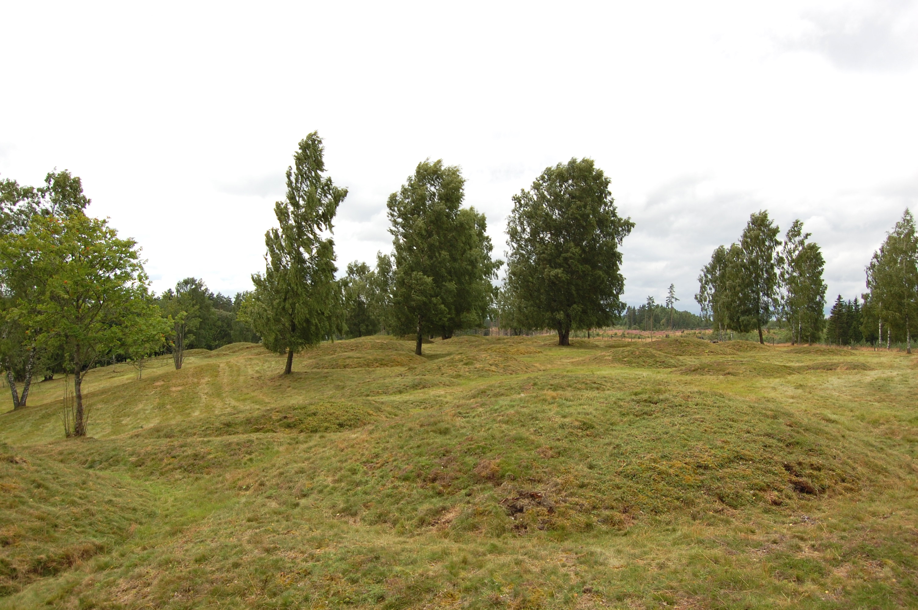 Gräberfeld von Hällsjö (Gemeine Ljungby), südlich der Kirchenruine Hallsjö